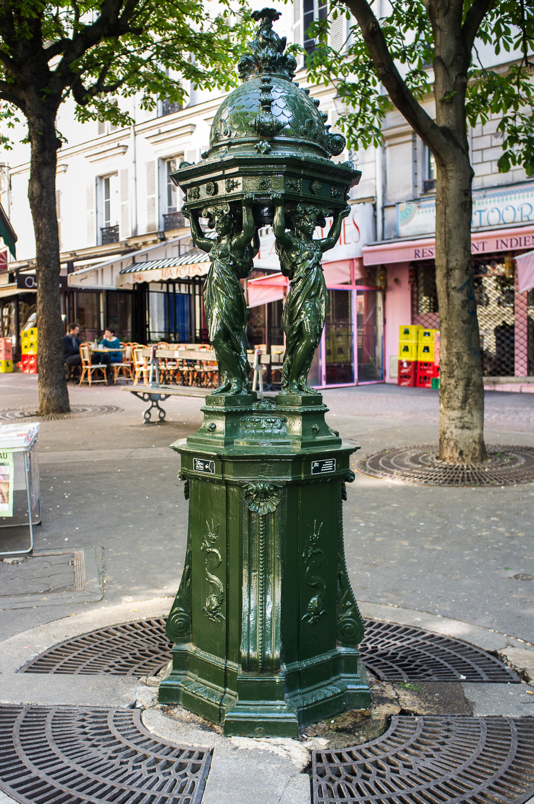 Fontaine Wallace de la place Gustave Toudouze Paris 9°